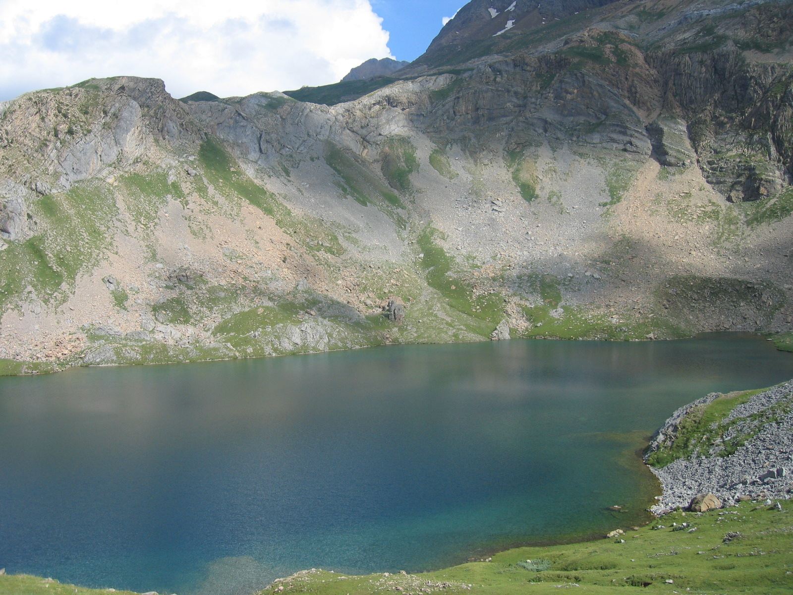 Aragonés: Ibón de Sabocos, Panticosa (Perineu aragonés)